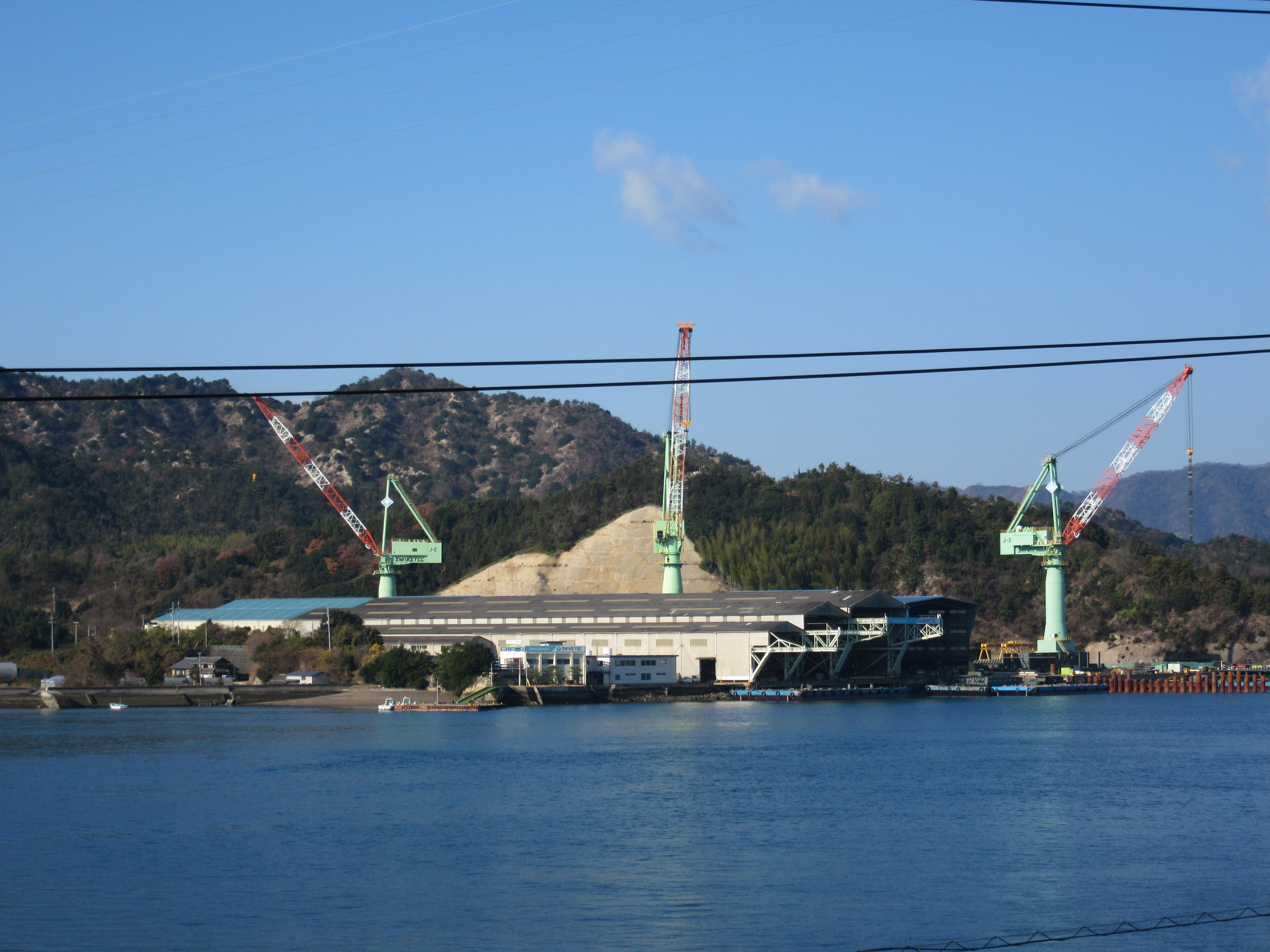 イワギテック